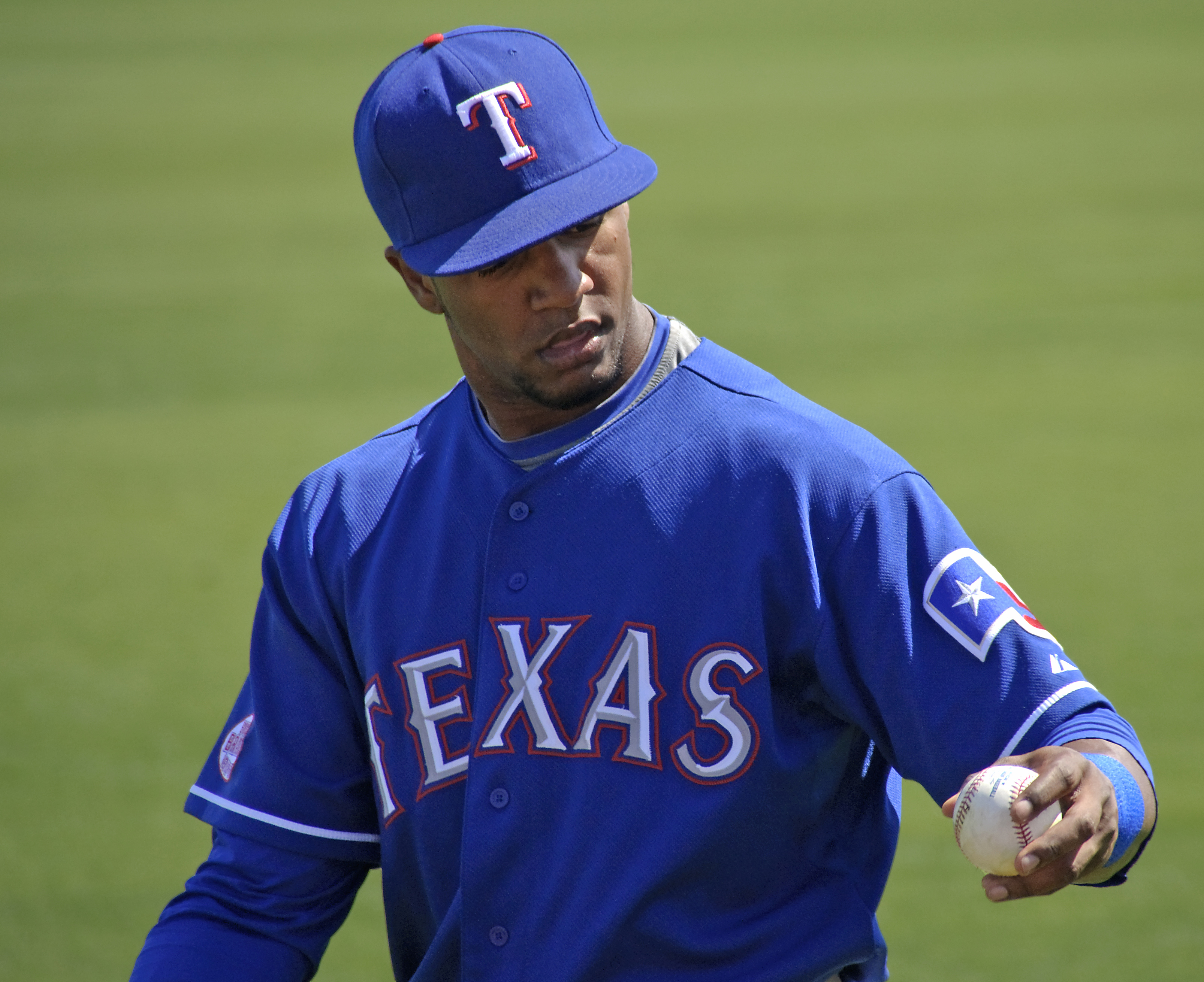 Julio Borbon